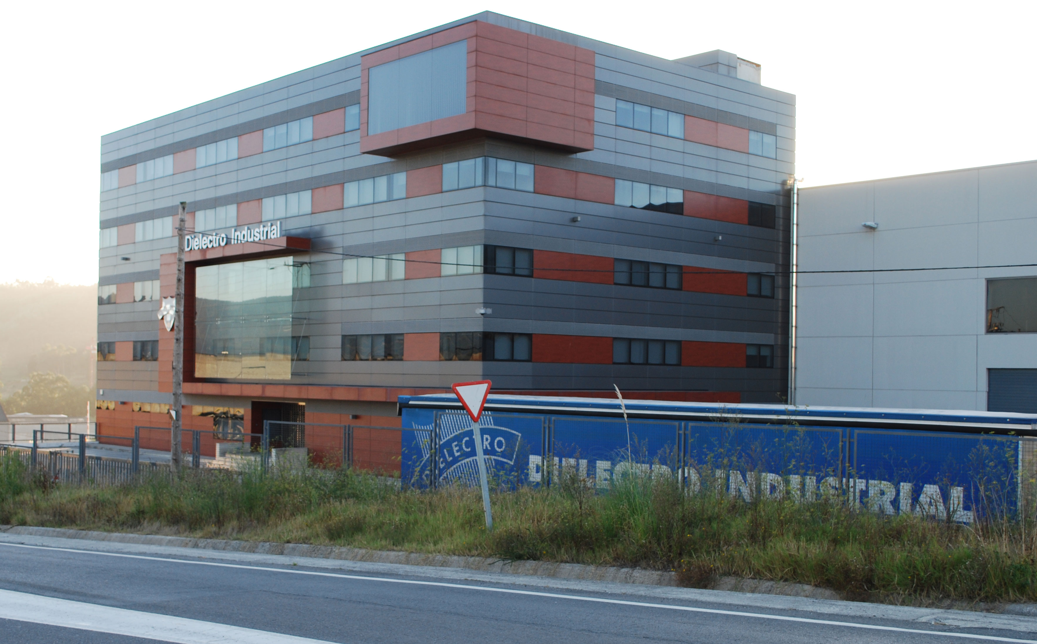 Centro loxístico de Dielectro Industrial no Polígono de Sabón Arteixo A Coruña Galiza Spain